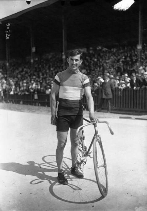 Grand Prix cycliste : Bellivier, gagnant